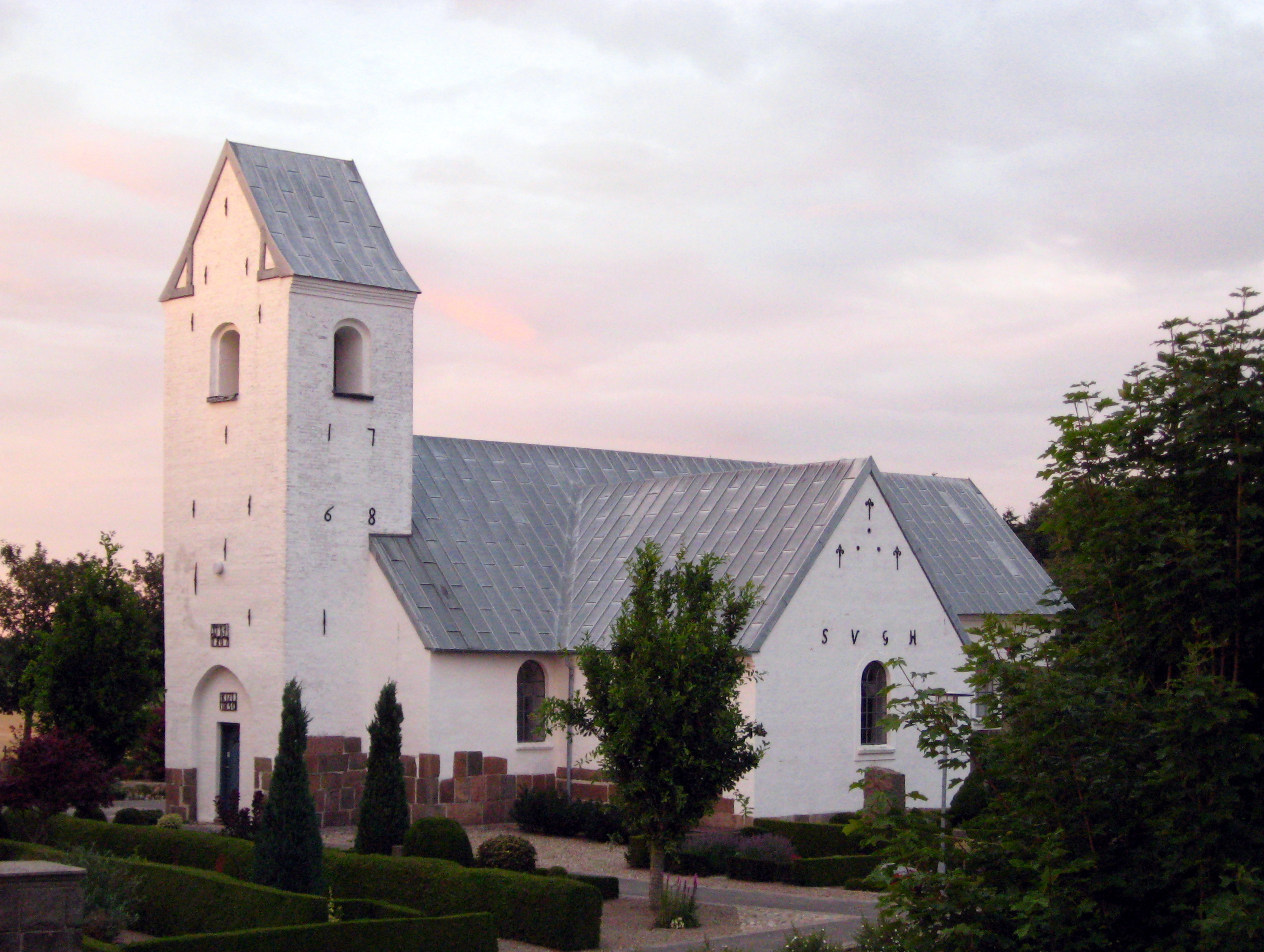 Horsens Kirke i Langholt